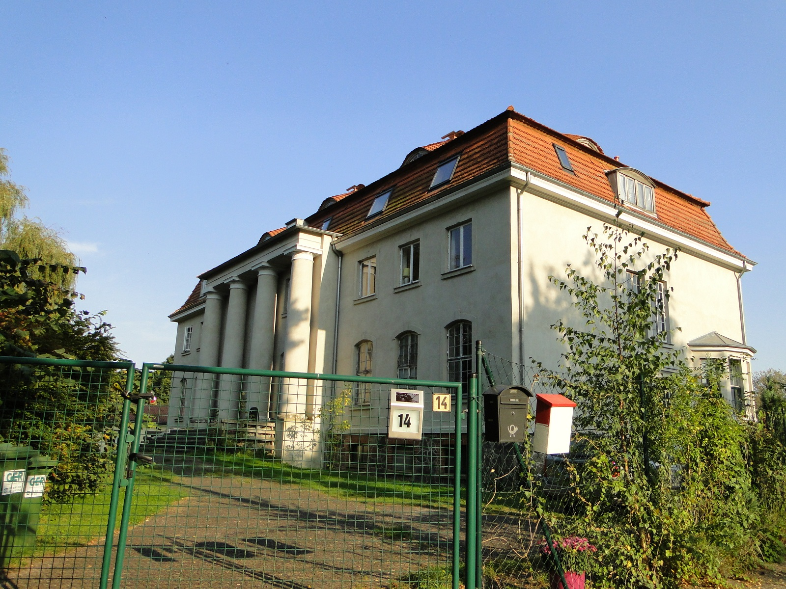 Gutshaus Damshagen bei Wismar